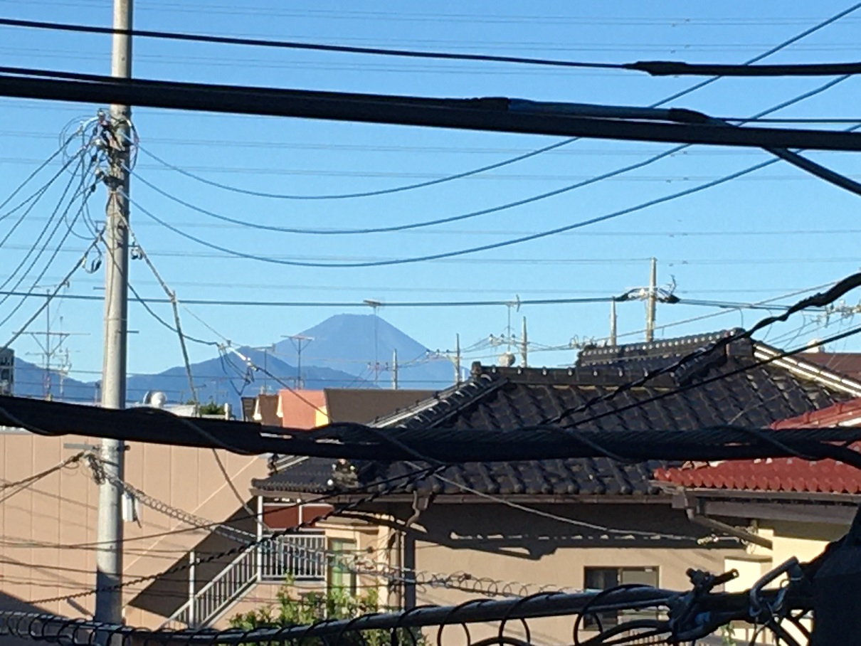 国分寺市富士本1丁目から見える富士山